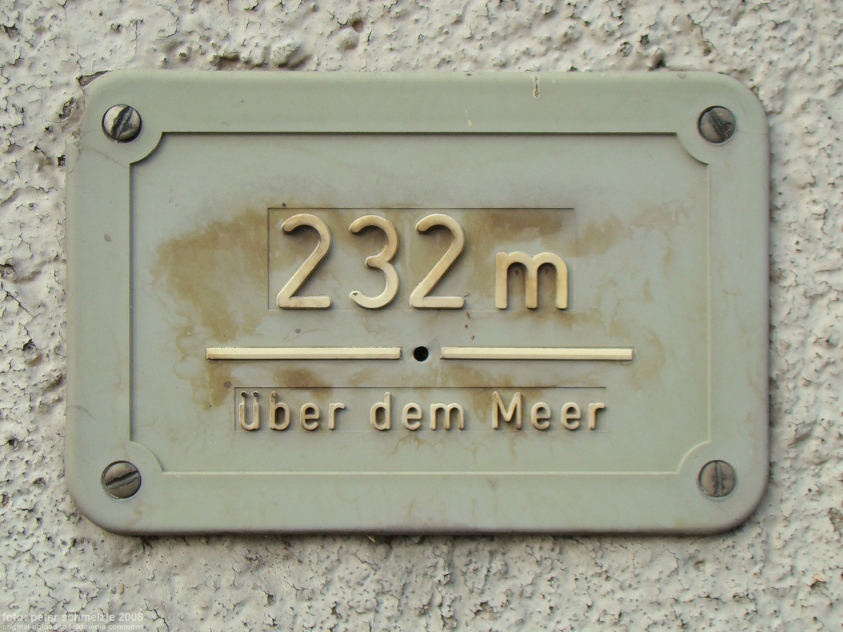 Altes Rathaus in Bretzfeld-Schwabbach